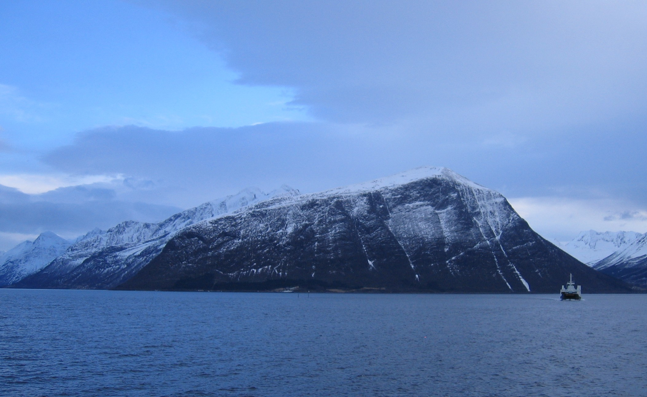 Romestranshornet, Ørsta,Møre og Romsdal, Sett frå Storfjorden